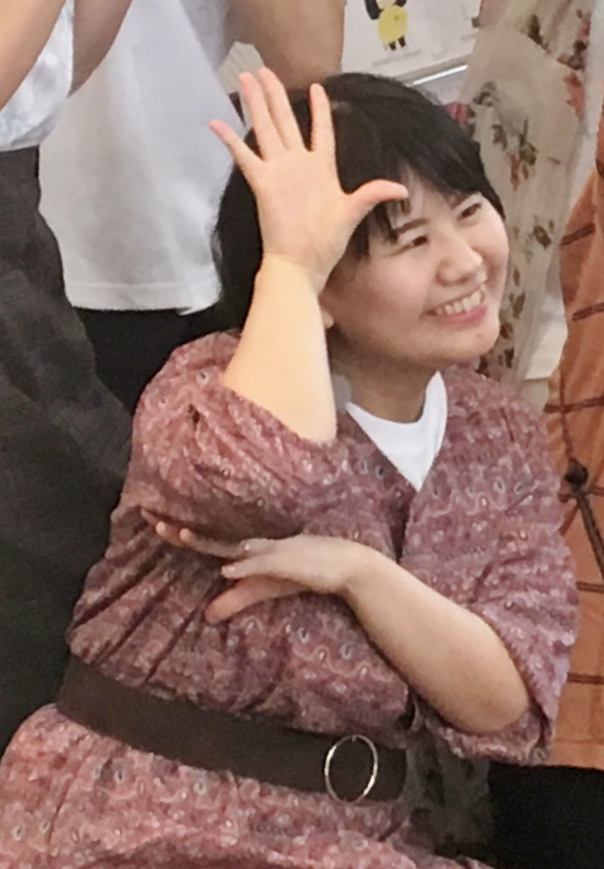 ふくだみゆき（2018年8月9日、新宿K's cinema） こんぷれっくす×コンプレックス舞台挨拶後ロビーにて